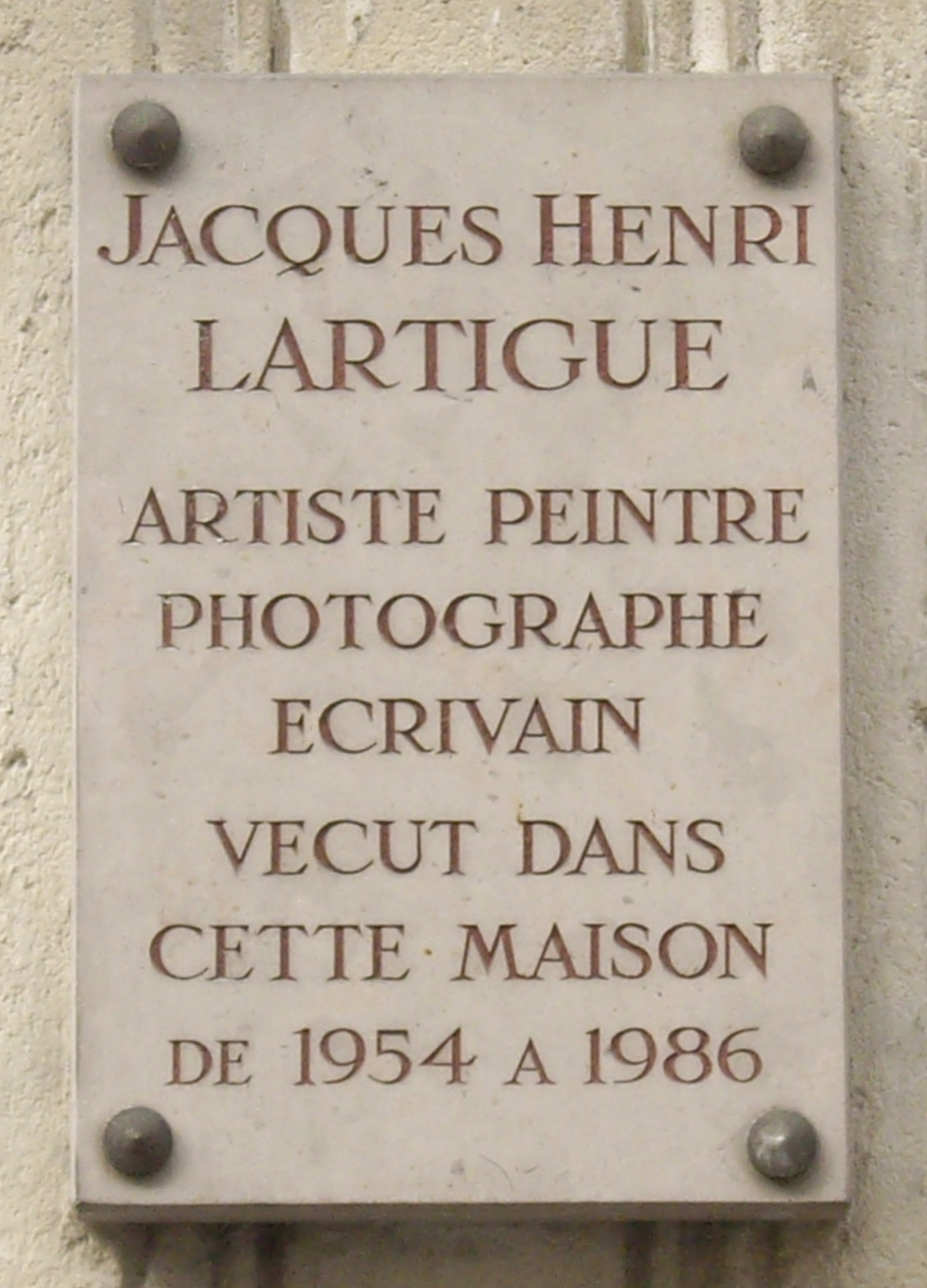 Plaque commémorative, 102 rue de Longchamp, Paris 16e. « Jacques-Henri Lartigue, artiste-peintre, photographe, écrivain, vécut dans cette maison de 1954 à 1986. »